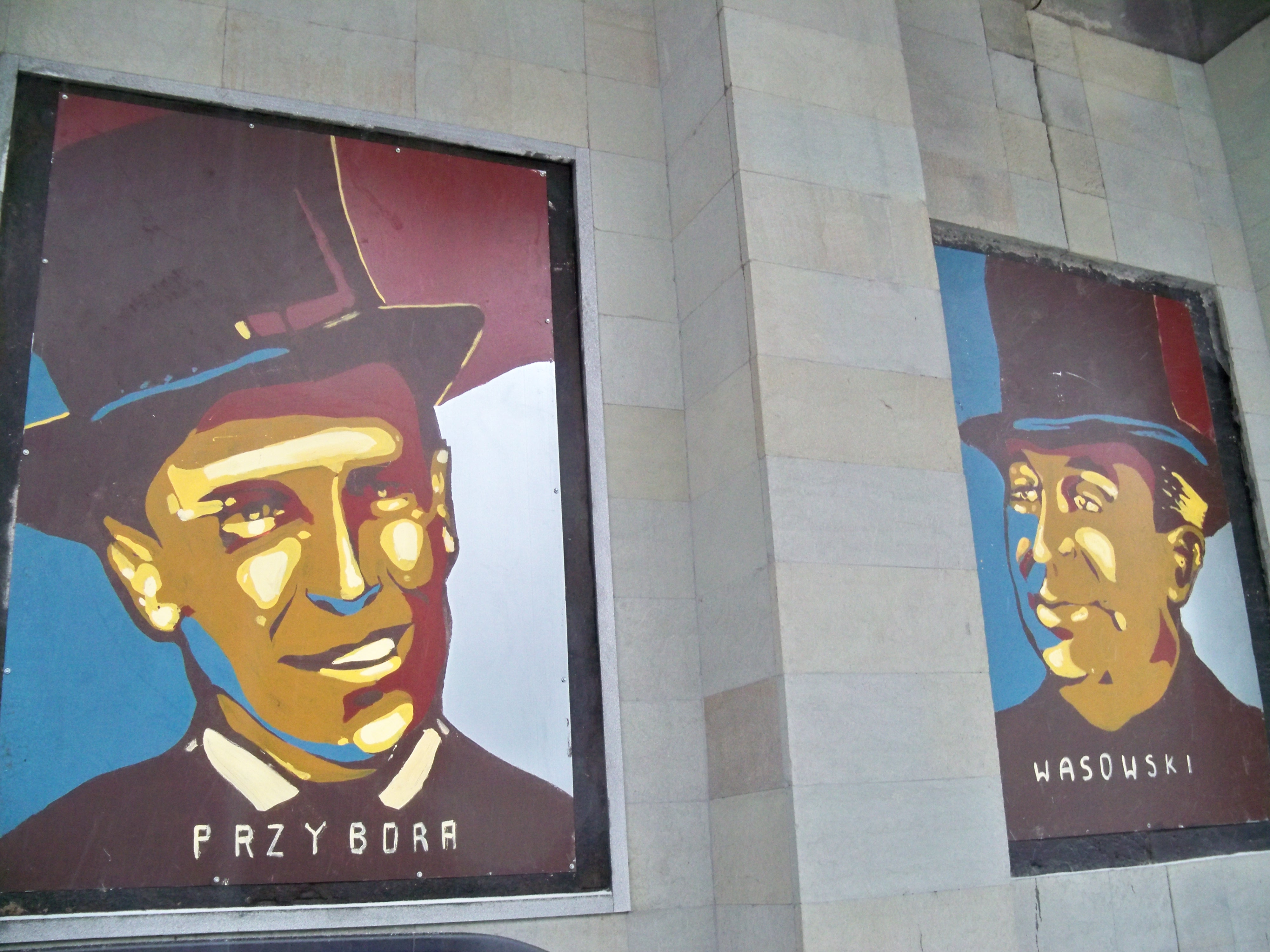 Galeria osobowości kultury Warszawy XX w. Trasa Łazienkowska w Warszawie. Portrety Jeremiego Przybory i Jerzego Wasowskiego.